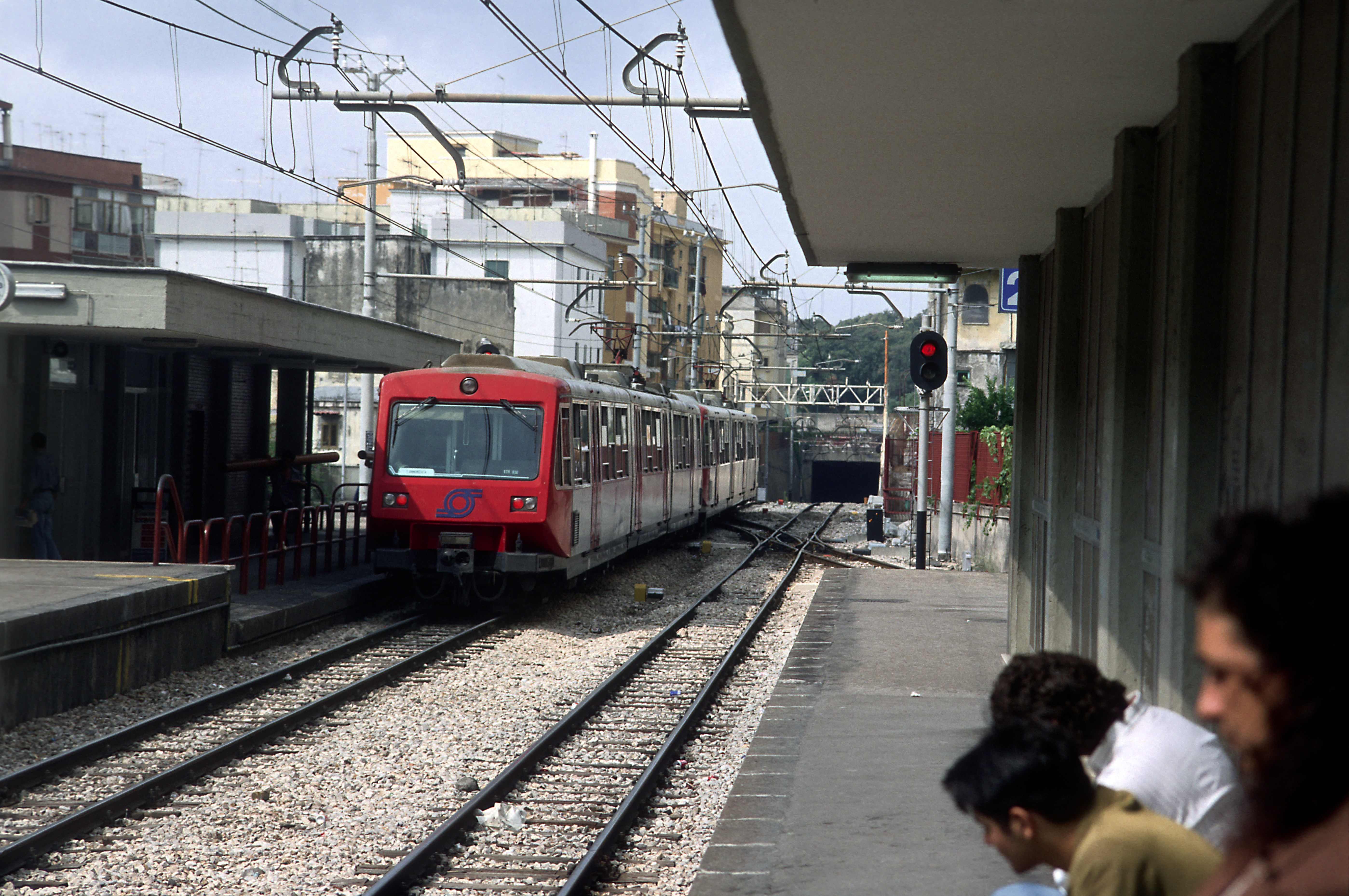 Nachschuss Richtung Napoli